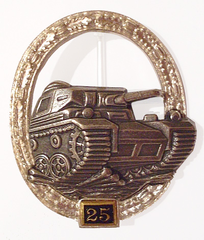 Panzerkampfabzeichen in Silber mit Einsatzzahl 25 (57er Version)